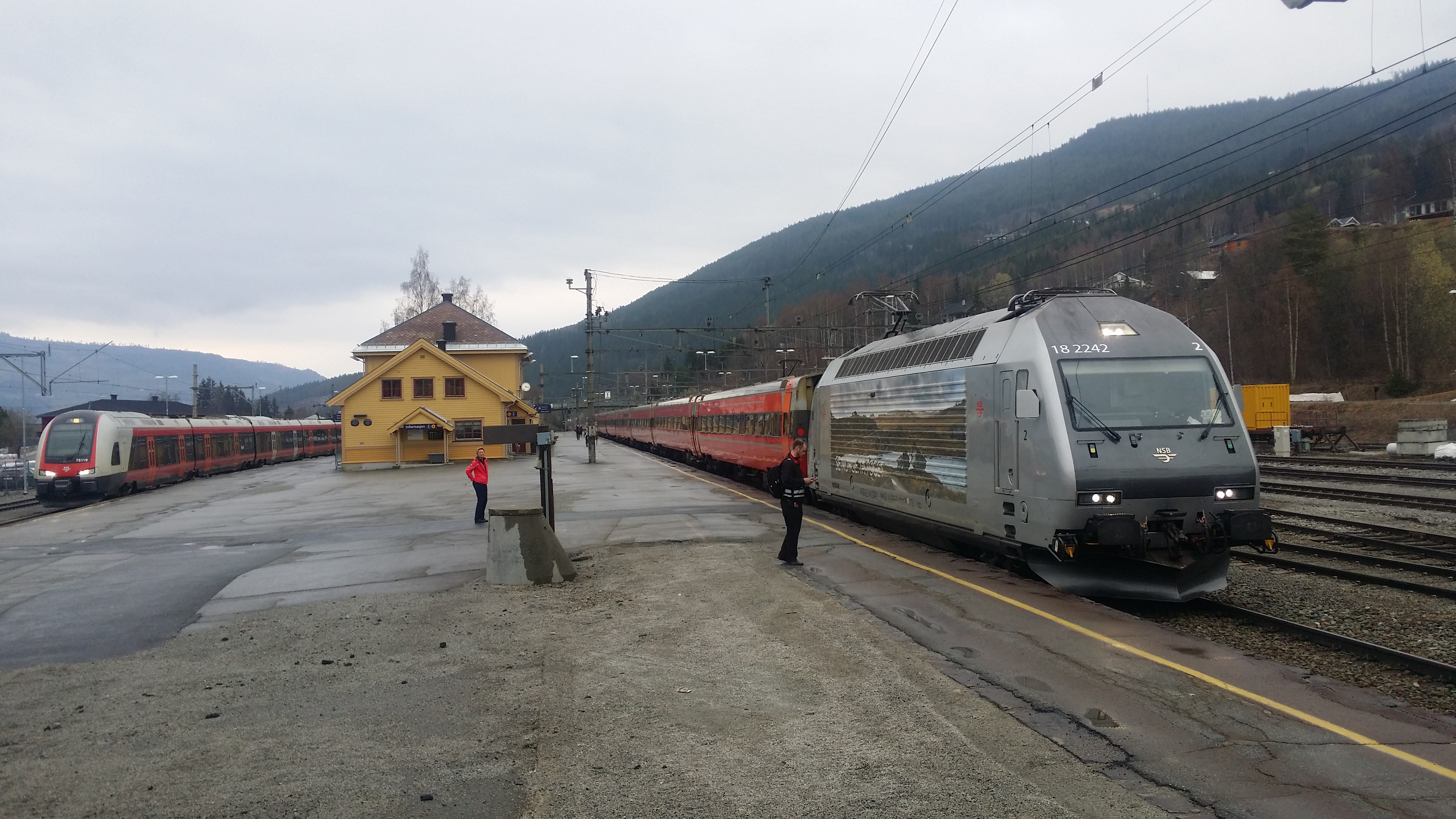 Ål stasjon med tog 601 til Bergen og ekstratog med tp. 75.